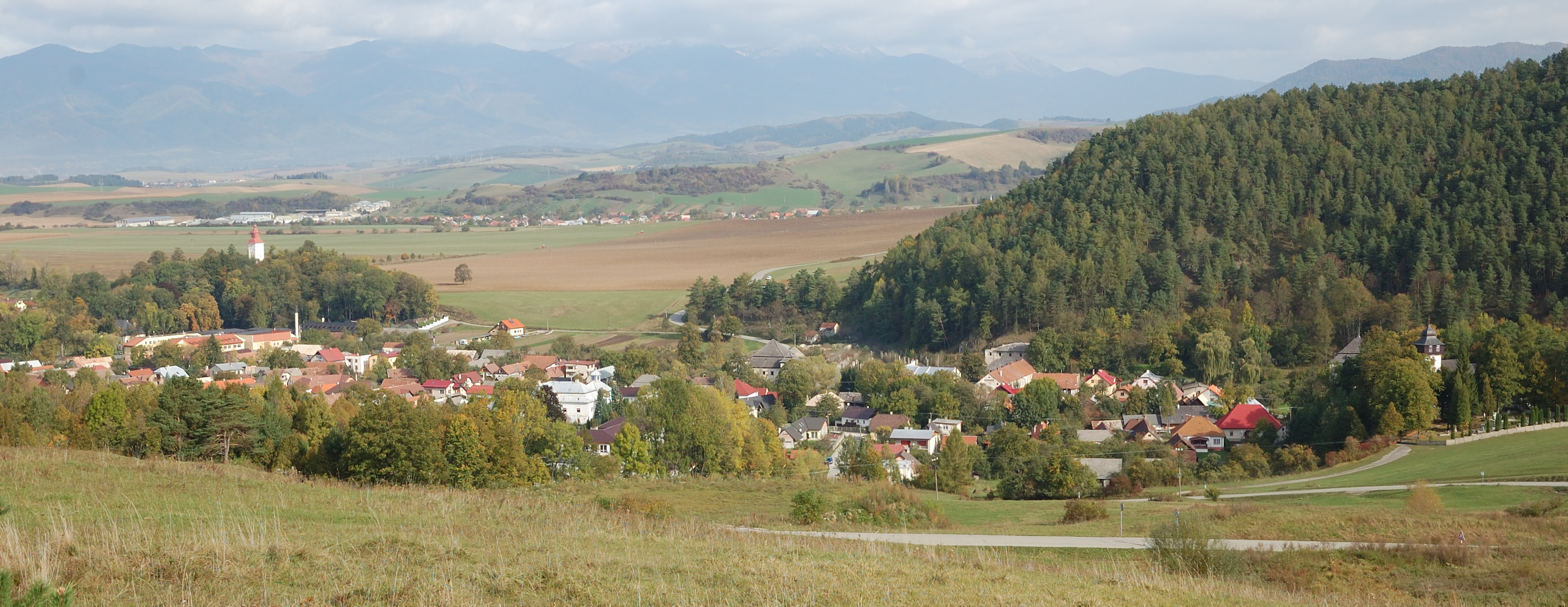 Necpaly - pohľad z juhu